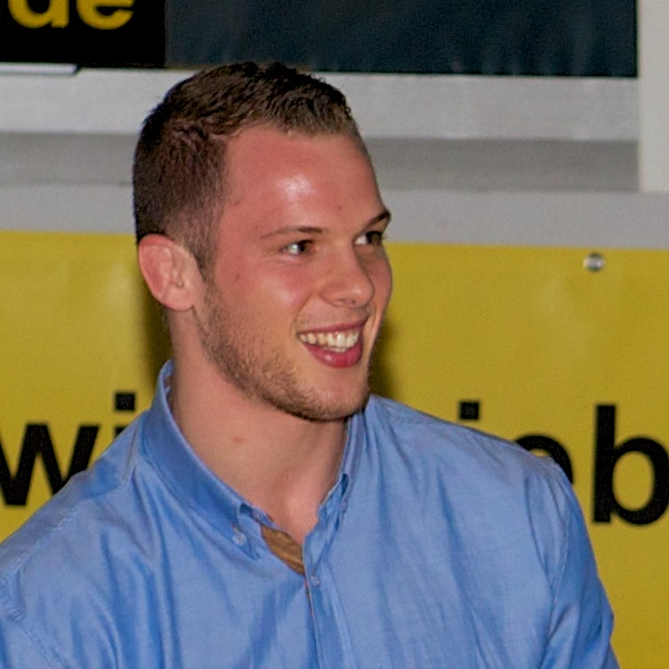 Oliver Hassler in Zell im Wiesental (2014)